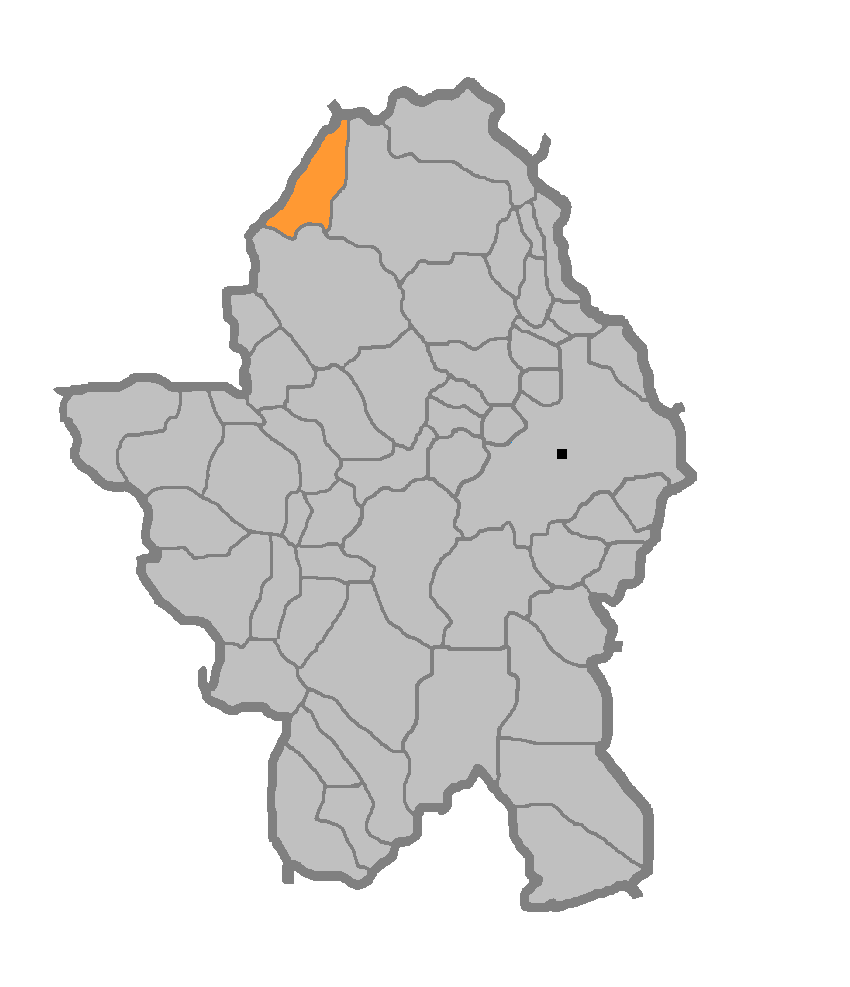 Мјесна заједница Верићи